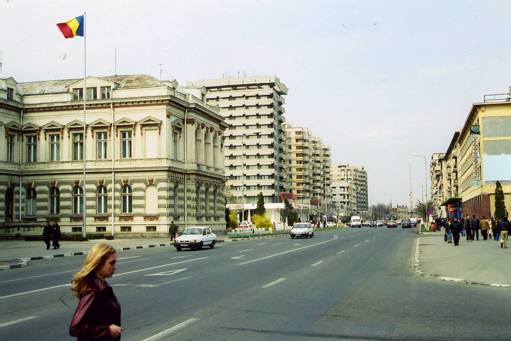 Bacău